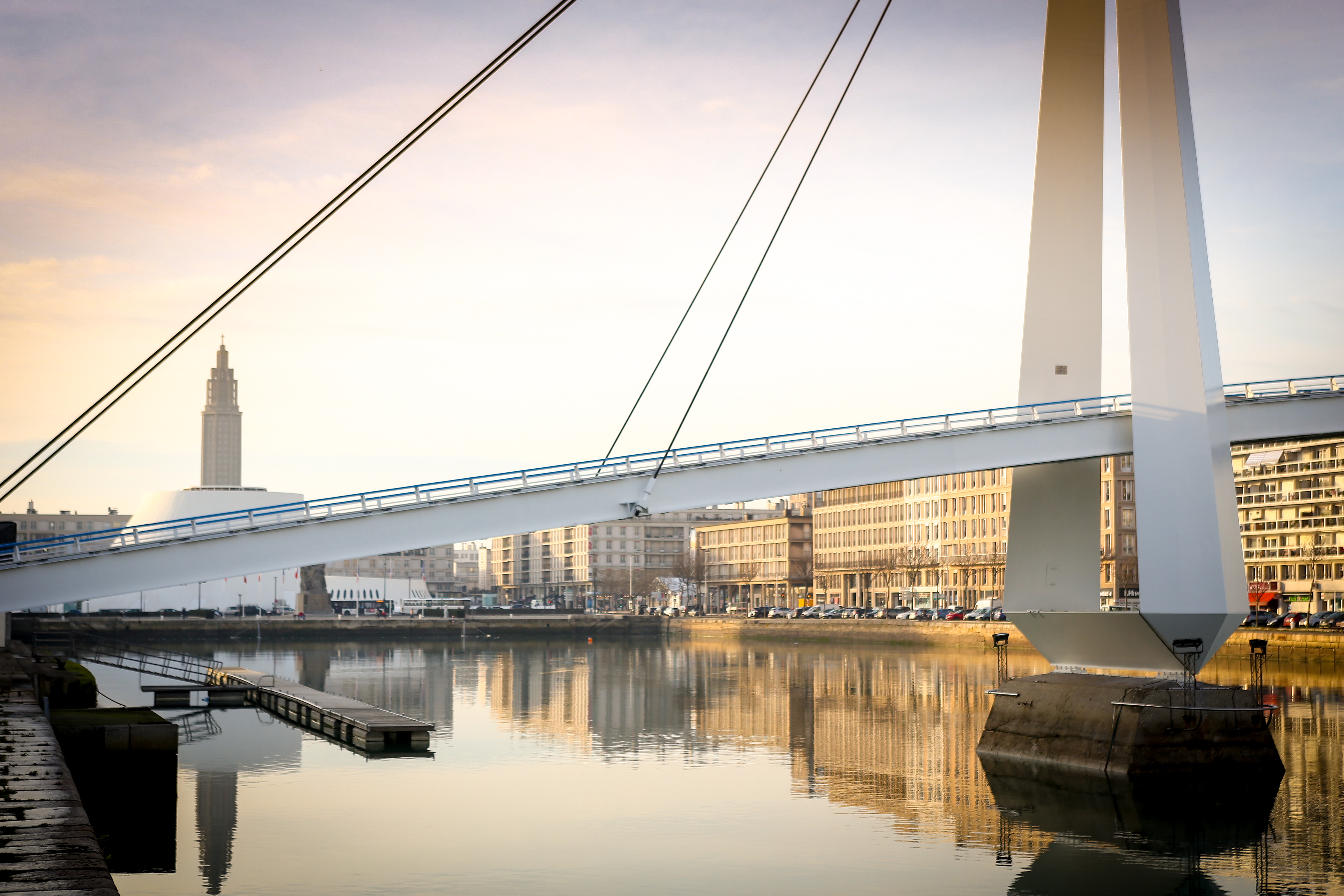 Le bassin du commerce et l'église Saint-Joseph